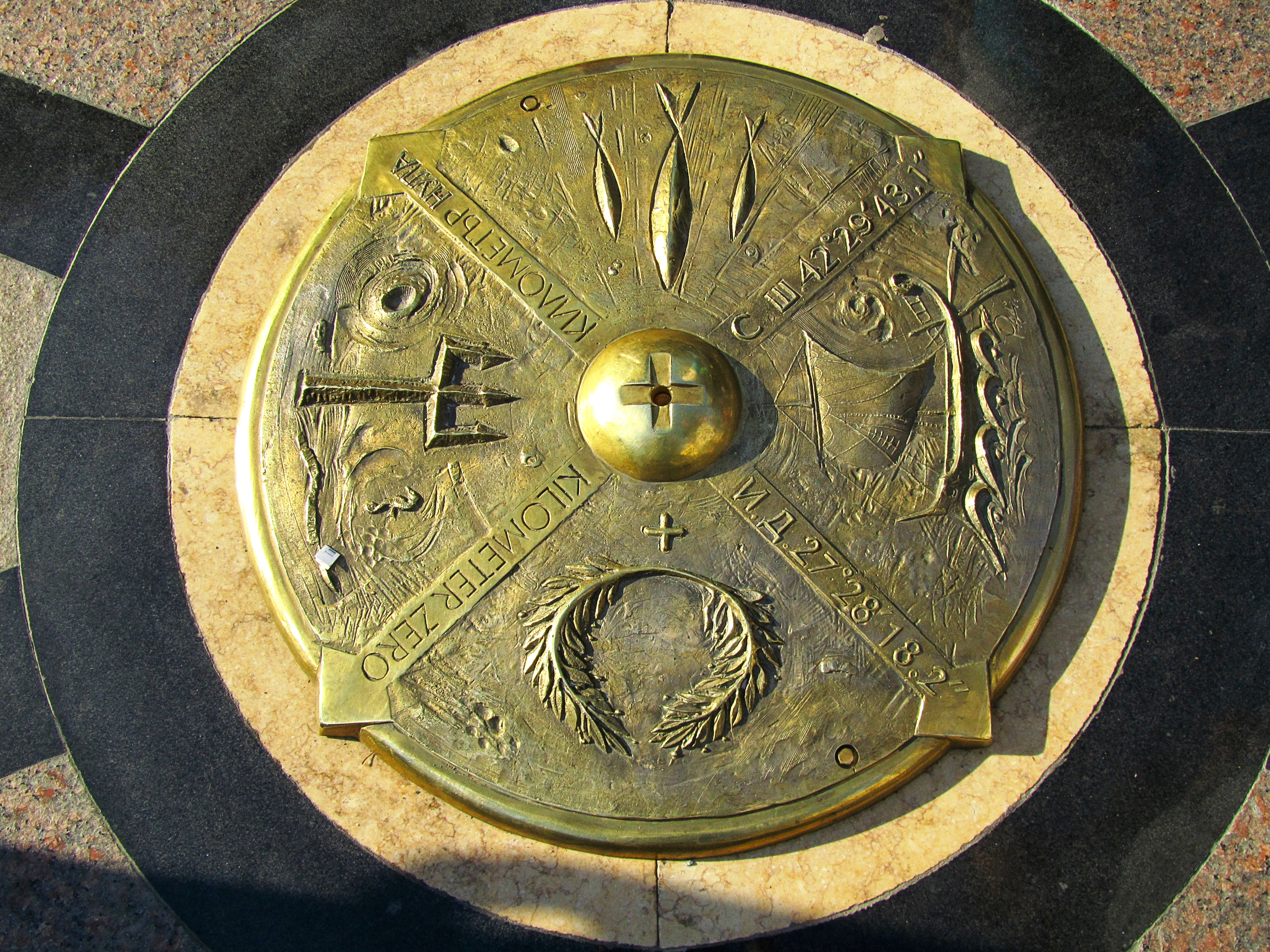 „Нулевия километър“, наричан и „Пъпа на Бургас“ е произведение на скулптора Радостин Дамасков, което отбелязва точните координати на града и неговата 42°29´43,1´´ северна ширина и 27°28´18,2´´източна дължина. Символите, които са изобразени на медния диск са жезълът на Нептун, рибите на Христос, корабът на аргонавтите и лавровият венец. Произведение е поставено на главната улица Алексансдровска през 2011 година